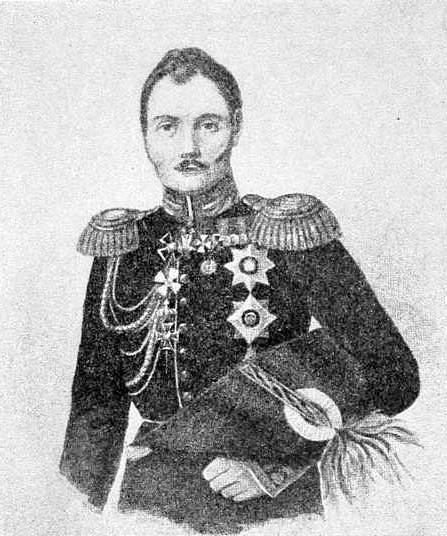 Данное изображение было использовано в статье «Веймарн, Петр Федорович» опубликованной в пятом томе «Военной энциклопедии», который был издан книгоиздательским товариществом Ивана Дмитриевича Сытина в 1911 году в столице Российской империи городе Санкт-Петербурге.